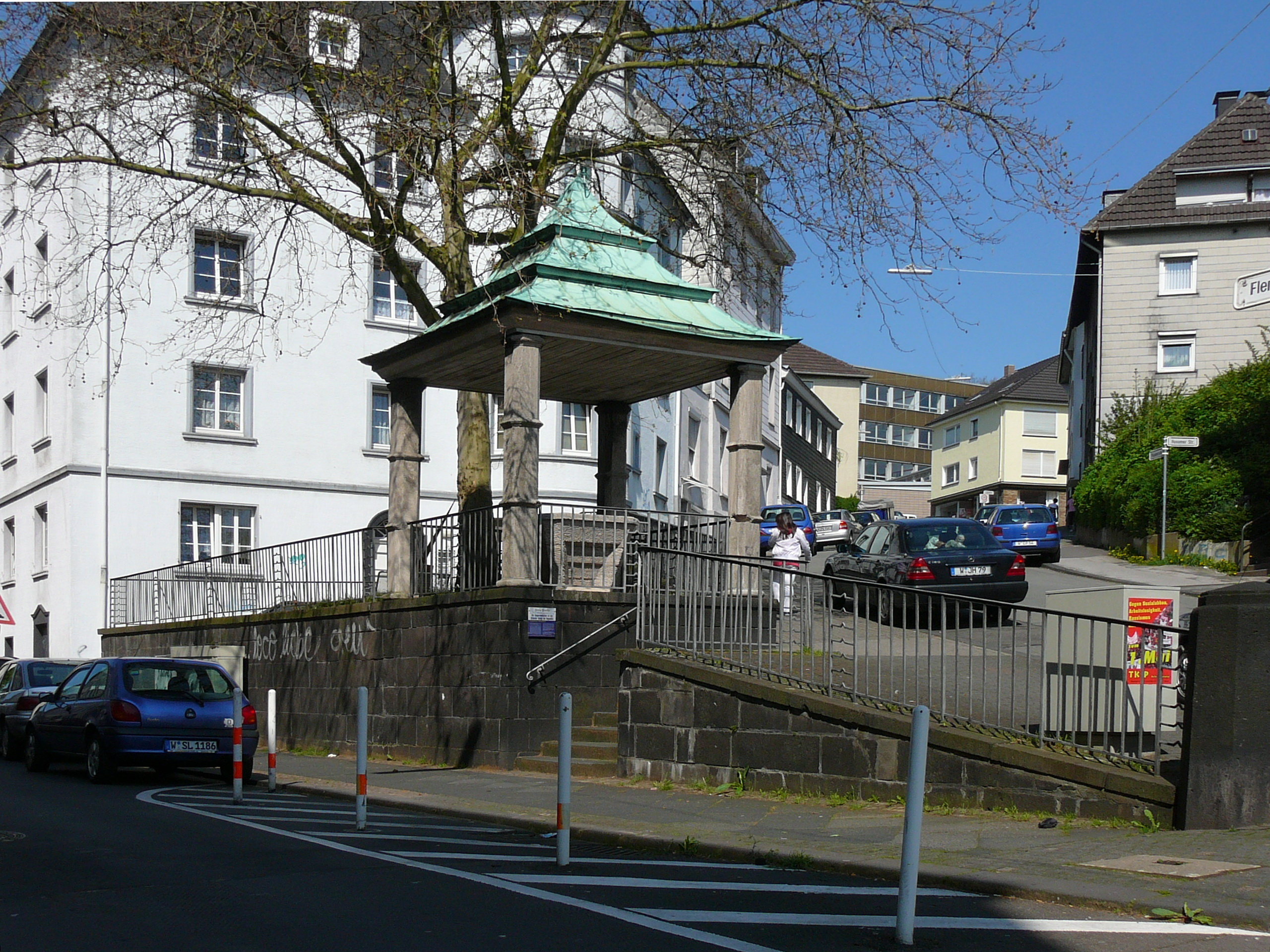 Paradestraße, Wuppertal